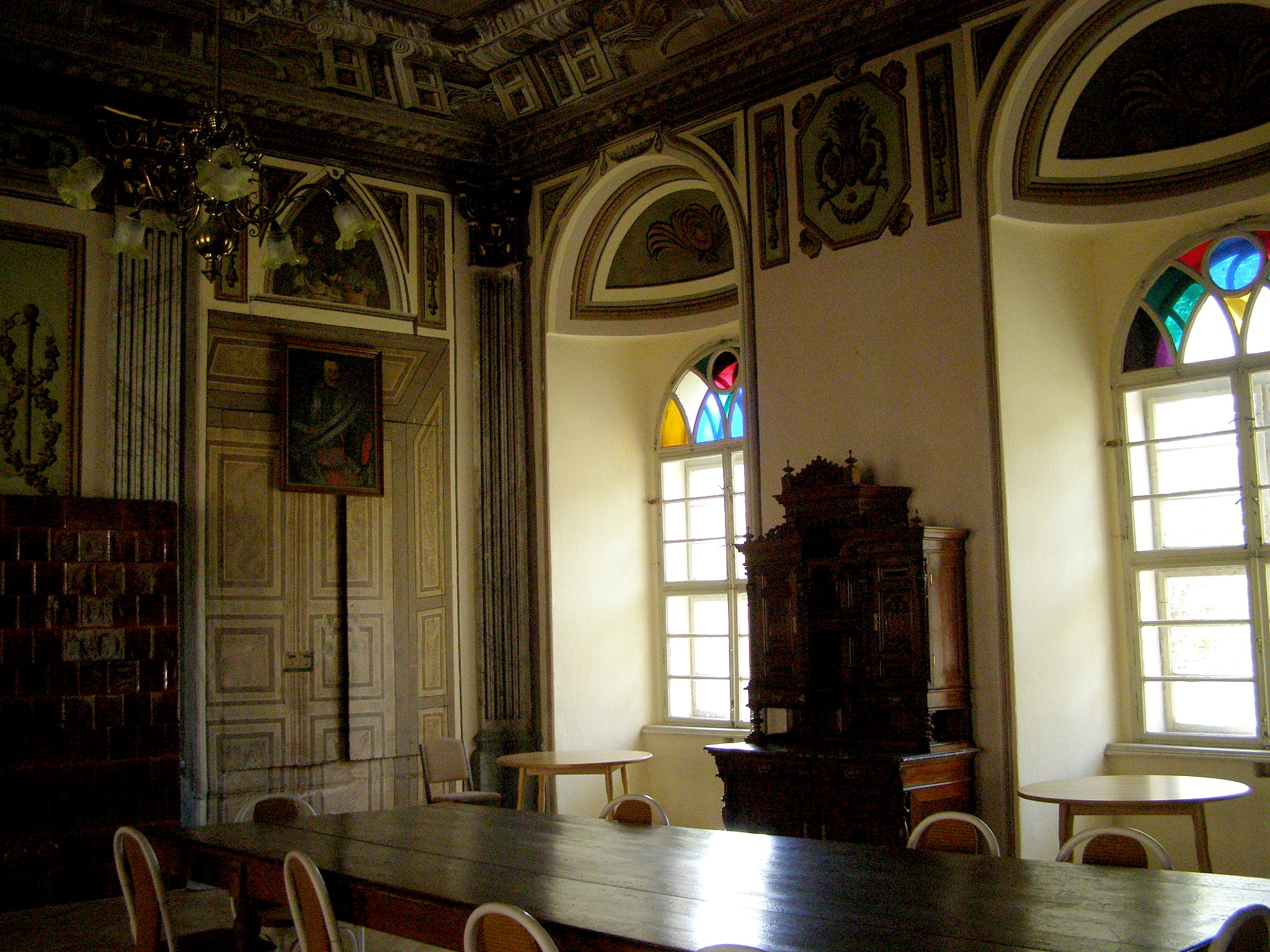 Pohľad do kláštorného refektára